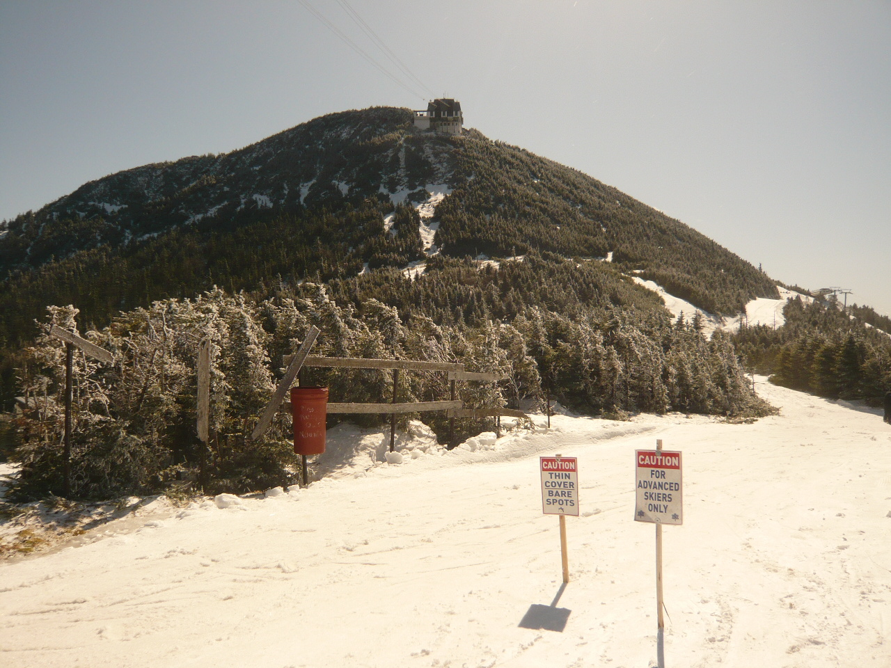 Jay Peak, VT - 04.2010